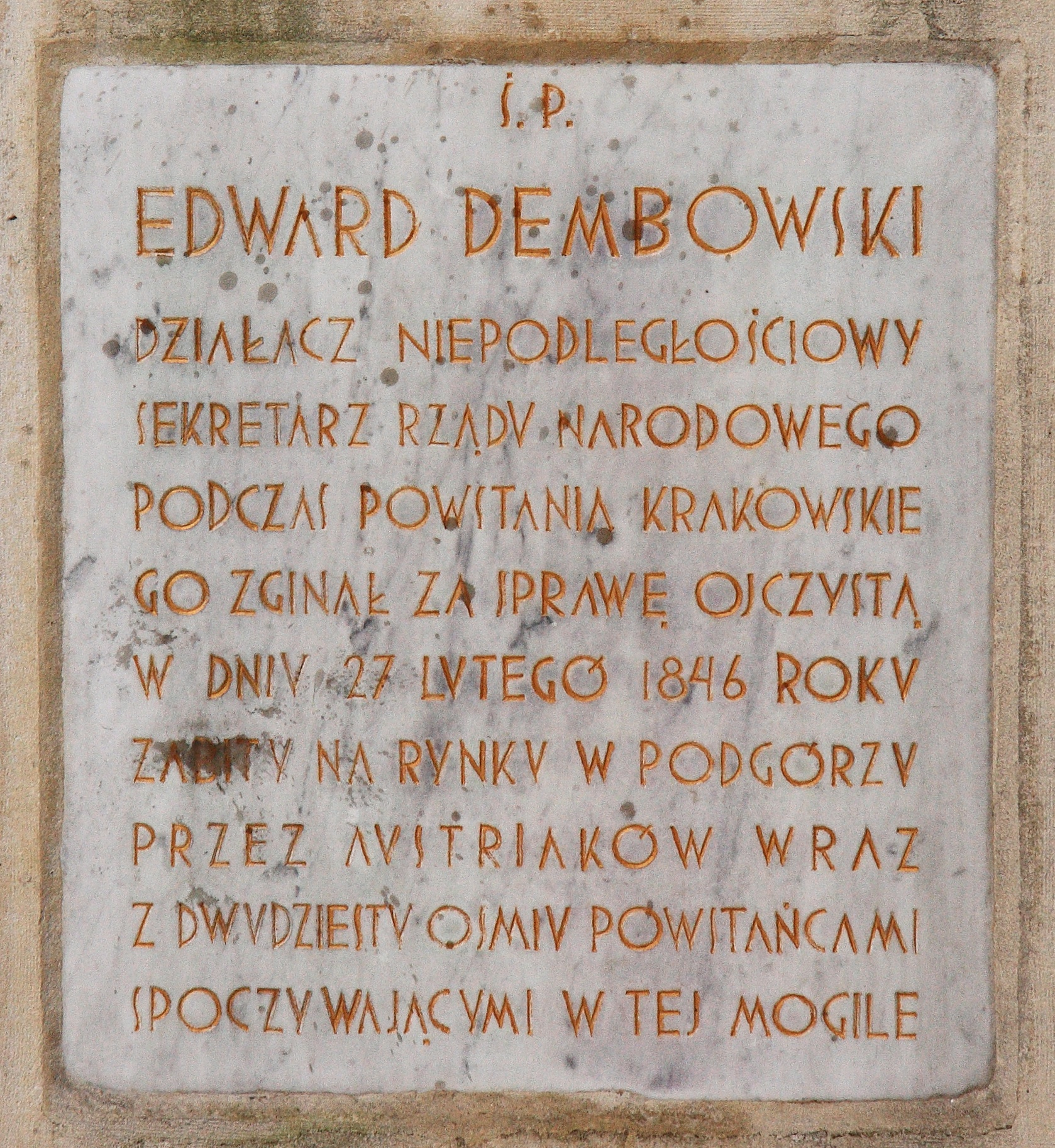 Płyta nagrobna grobu Edwarda Dembowskiego oraz innych powstańców poległych w 1846 roku w czasie Powstania Krakowskiego. Edward Dembowski jest pochowany na starym Cmentarzu Podgórskim w Krakowie.